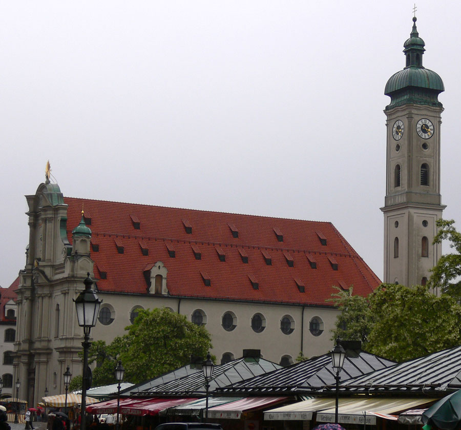 Church of the Holy Spirit in Munich (Bavaria) Description in de wikipedia Bildbeschreibung: Heiliggeistkirche mit Blick zum Tal, im Vordergrund ist ein Teil es Viktualienmarktes zu sehen Quelle: Eigenes Bild Photograph: Matthias Kern Datum: 01. Juni 2006